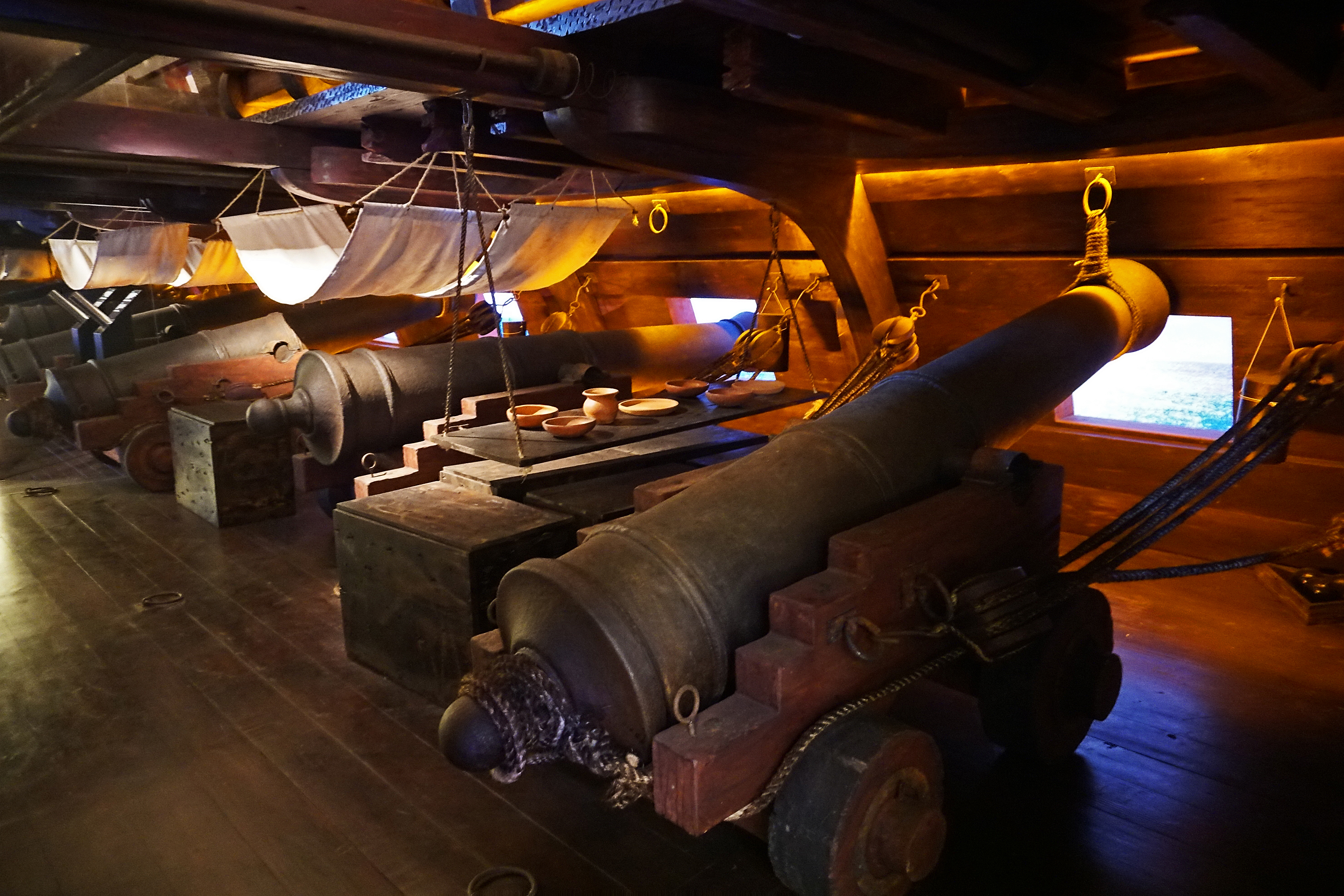 Réplica a escala real de la primera y segunda baterías de cañones dedel galeón Nuestra Señora de Guadalupe (siglo XVIII), Museo de las Atarazanas Reales, Ciudad Colonial Santo Domingo